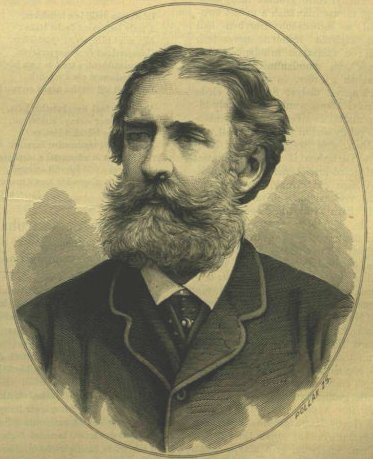 Széchényi Imre magyar országgyűlési képviselő, főrend, diplomata és zeneszerző.